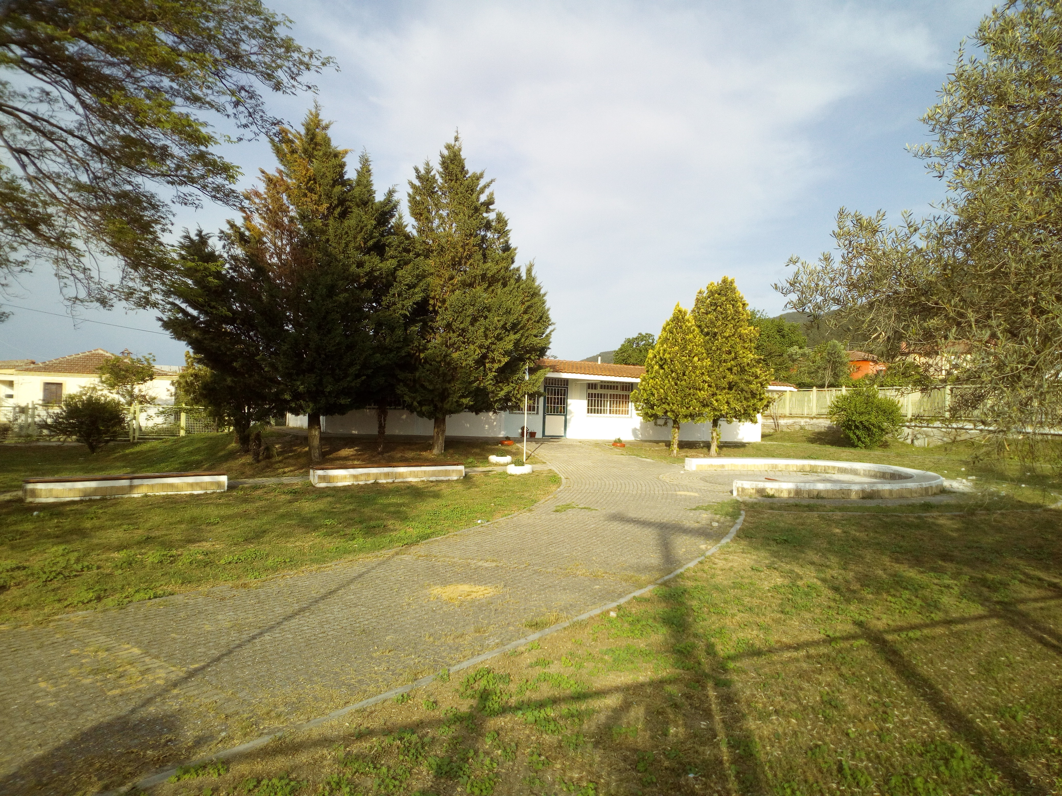 DS1 20180429 183351